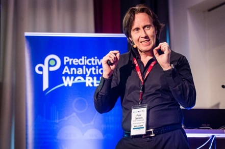 Peter Gentsch